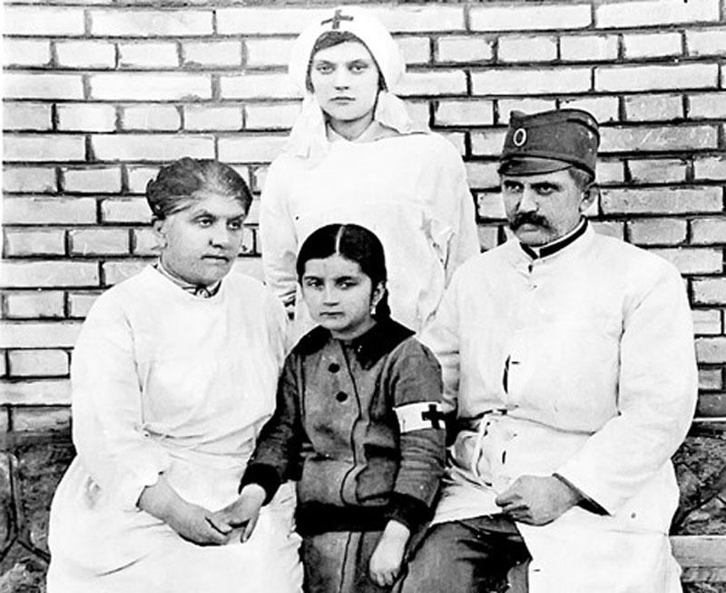 Srpski (latinica): Marija Vučetić Prita, srpaska lekarska u Vojnoj bolnici Niš 1915.